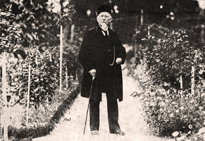 Diese leider nur gering aufgelöste Wiedergabe einer Fotografie aus der Urheberschaft der Familie um Ferdinand Tellgmann zeigt den Maler, Daguerreotypie-Pionier und Porträt-Fotografen und Begründer der Fotografen-Dynastie Tellgmann in fortgeschrittenem Alter mit Hut, Gehrock und Spazierstock zwischen (Garten-?)Beeten ...